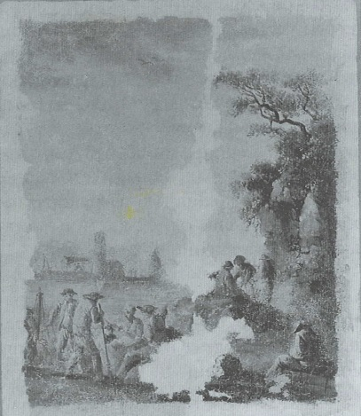 П.И. Баранов